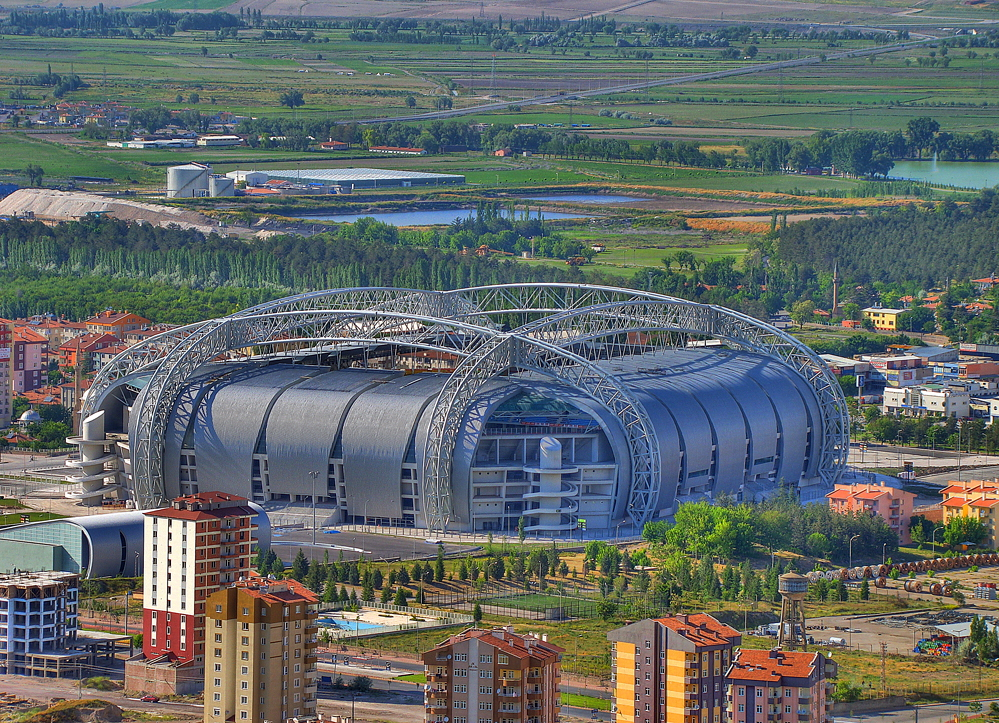 Kadir Has Stadyumu Toplam Seyirci:40,458 Koltuklu Seyirci:32,86